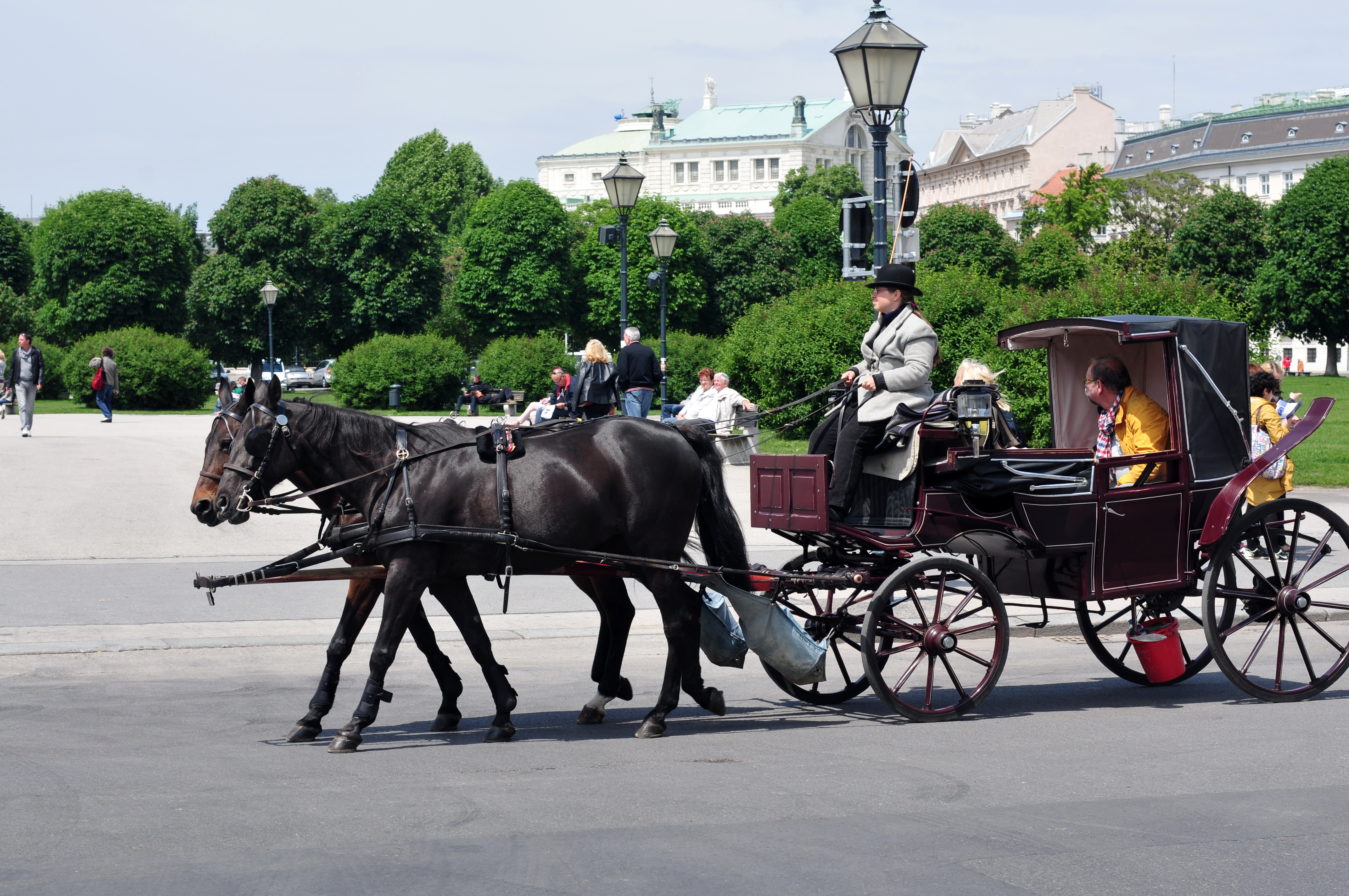 Wien